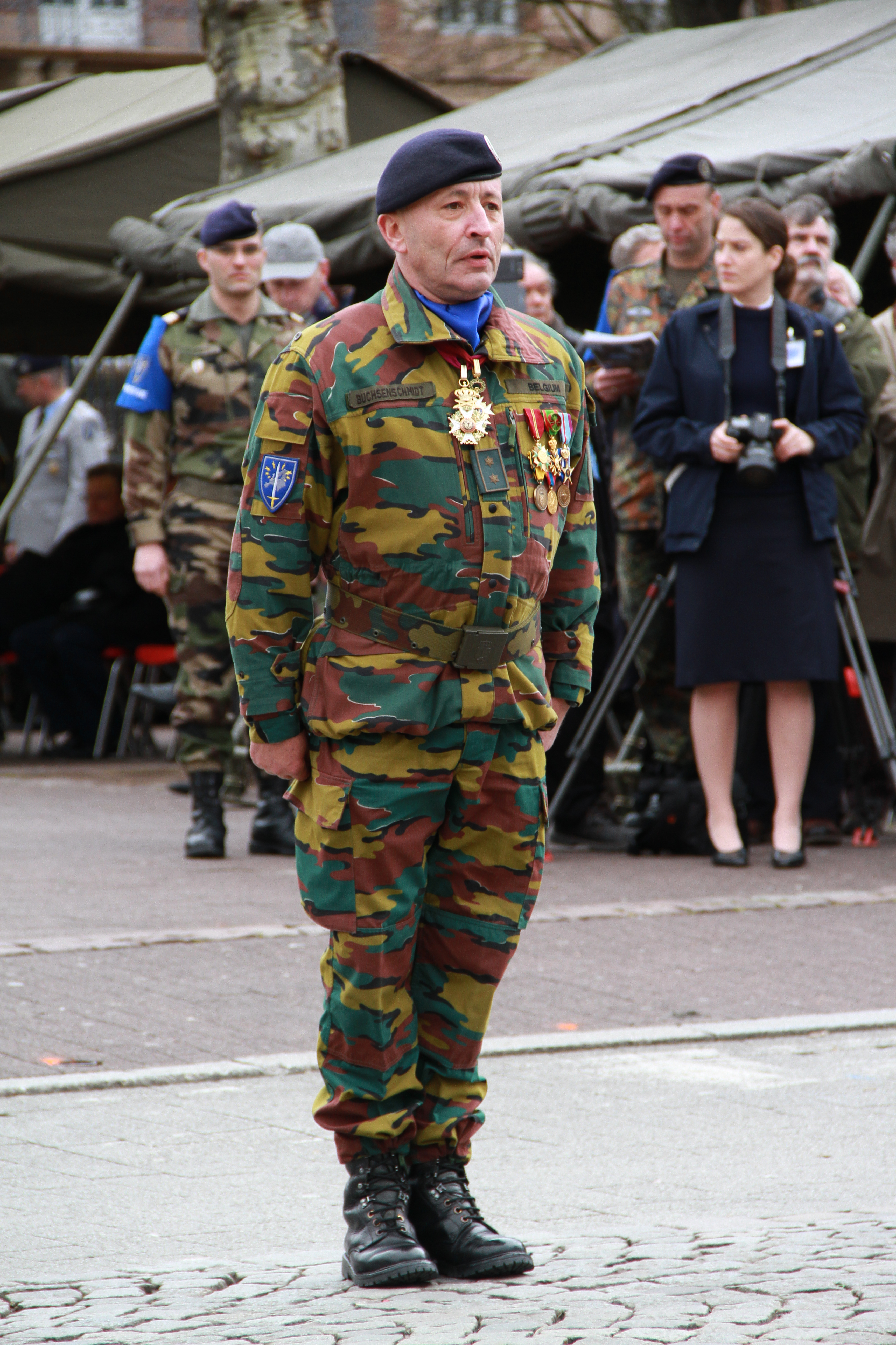 Le général Guy Buchsenschmidt chef d'état major de l’Eurocorps lors de la prise d’armes de fin de mission de l’Eurocorps en Afghanistan, place Broglie à Strasbourg 31 janvier 2013, en présence de M. Pieter De Crem, ministre belge de la Défense, et de M. Kader Arif, ministre délégué auprès du ministre de la Défense, chargé des Anciens Combattants.